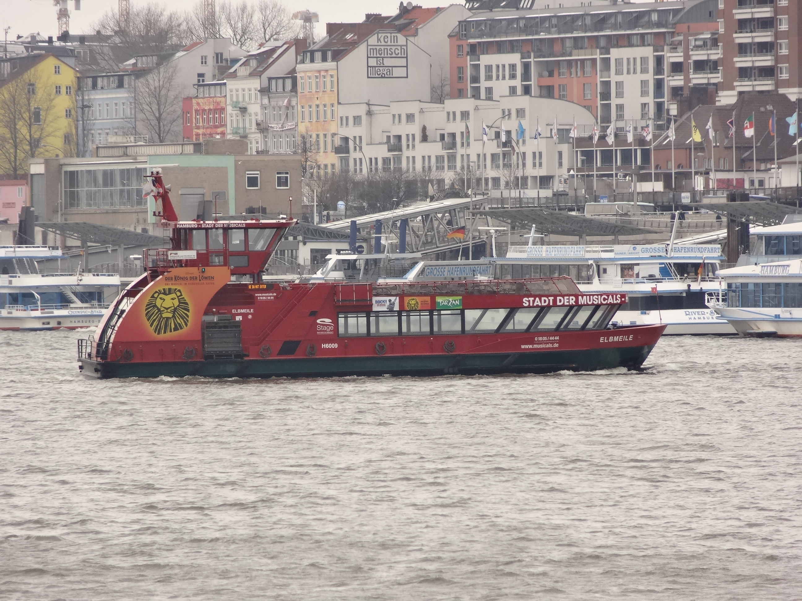 Elbmeile (Schiff, 2005)